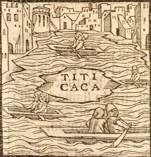 Первое изображение оз.Титикаки в Европе, 1553